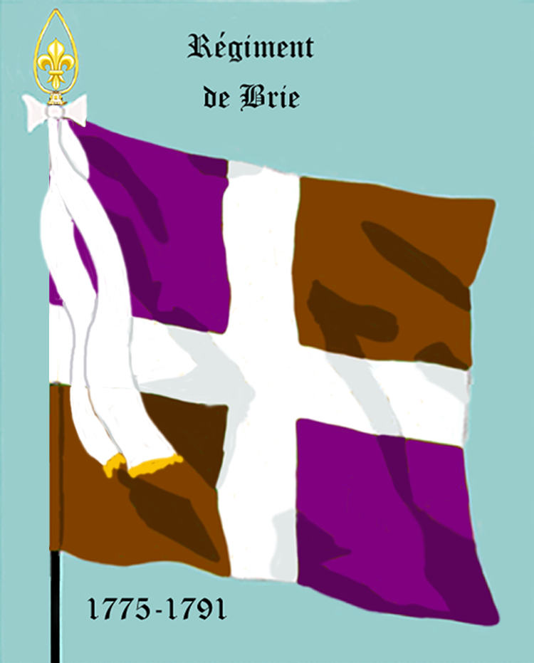 Ordonnanzfahne eines königlich französischen Infanterie-Regiments. - Entnommen und überarbeitet aus: „LES UNIFORMES ET LES DRAPEAUX DE L'ARMÉE DU ROI“ Marseille 1899. (Drapeau d'Ordonnance d' un régiment française d'infanterie royale.)